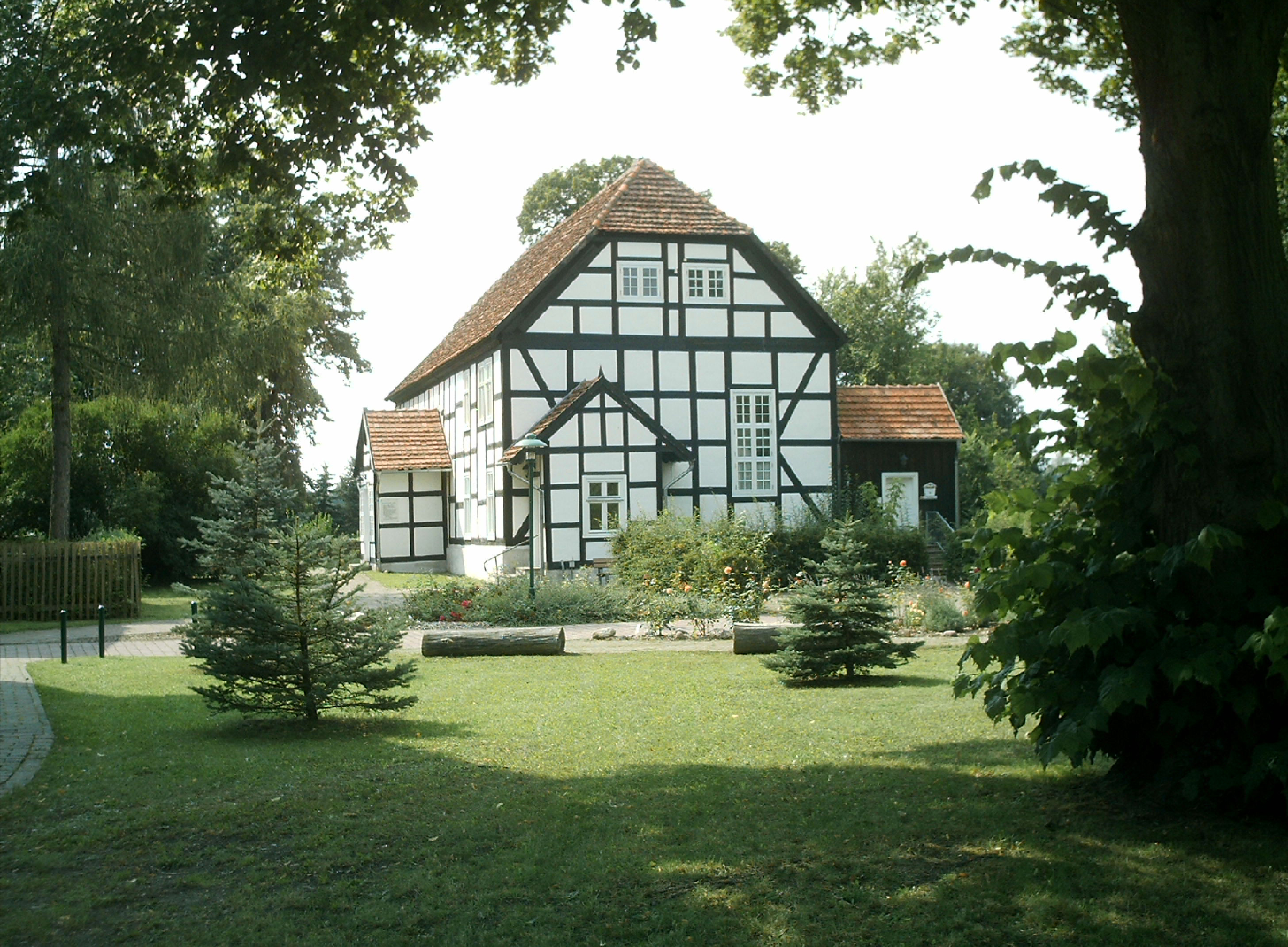 Eggesin, Fachwerkkirche von 1731